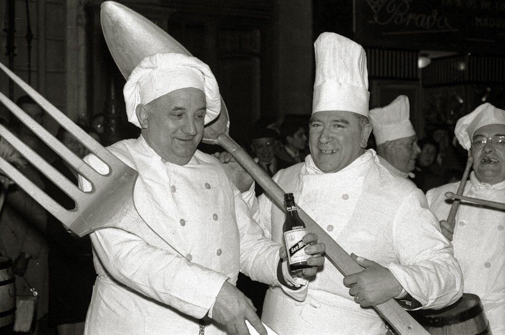 Título original: Tamborrada de San Sebastián (69/93) Localización: San Sebastián (Guipúzcoa)